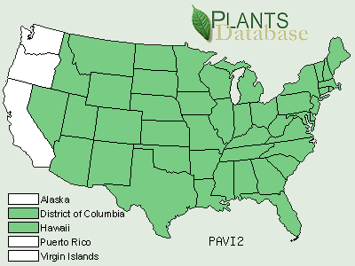 Verbreitung der Rutenhirse distribution of switch grass